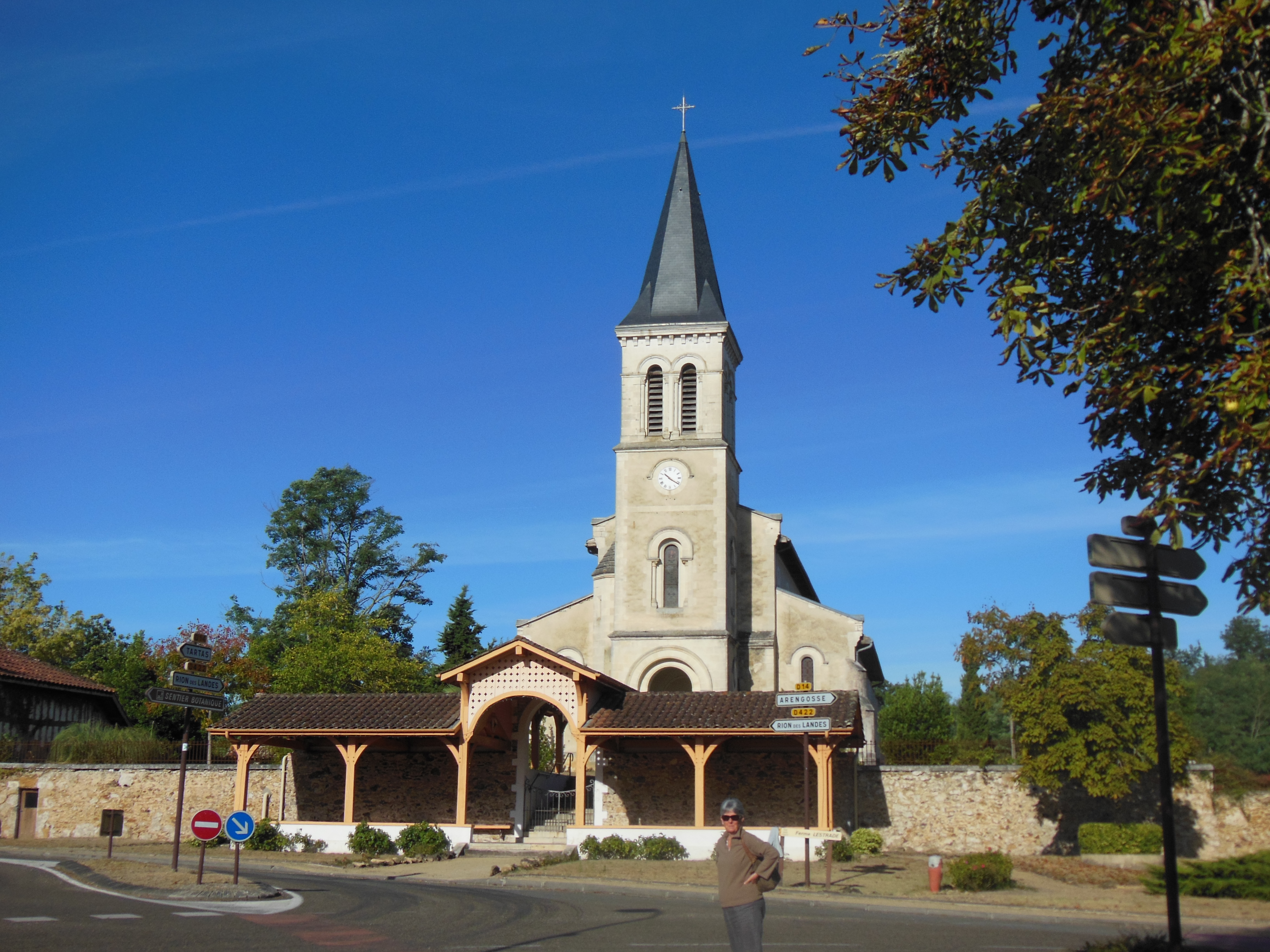 Église Saint-Sever de Villenave, dans le département français des Landes